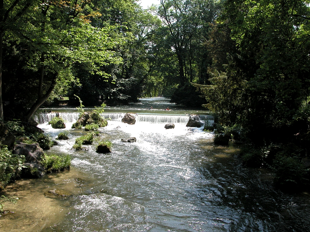 Englischer Garten, München (Munich), Deutschland (Germany)